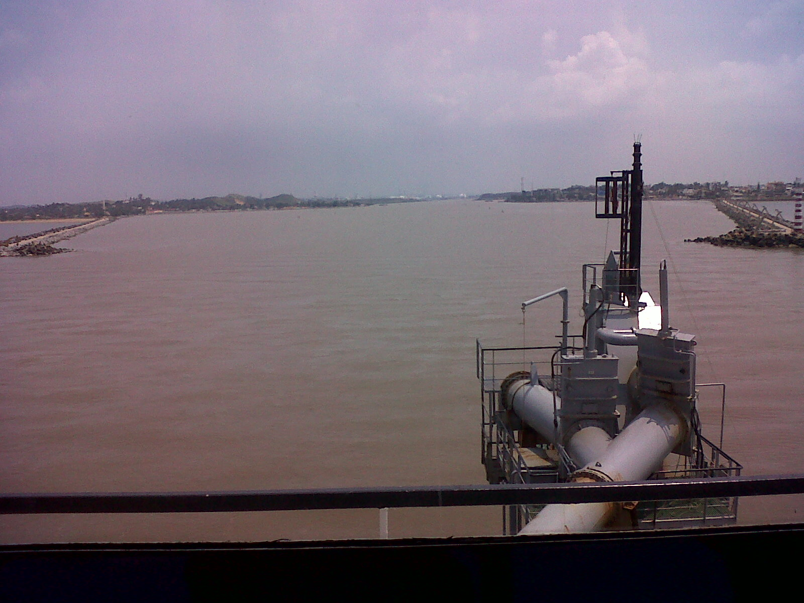 Foto tomada a bordo de una embarcación entrando a escolleras del Río Coatzacoalcos, Veracruz, México, teniendo a la derecha la ciudad de Coatzacoalcos y a la izquierda Villa Allende, perteneciente al municipio de Coatzacoalcos